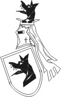 Grb porodice Balšić, kraj XIV i početak XV vijeka.